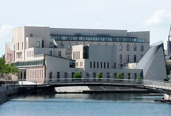 Nouveau quartier de Strasbourg, les Fronts du Neudorf. Cité de la musique et de la danse